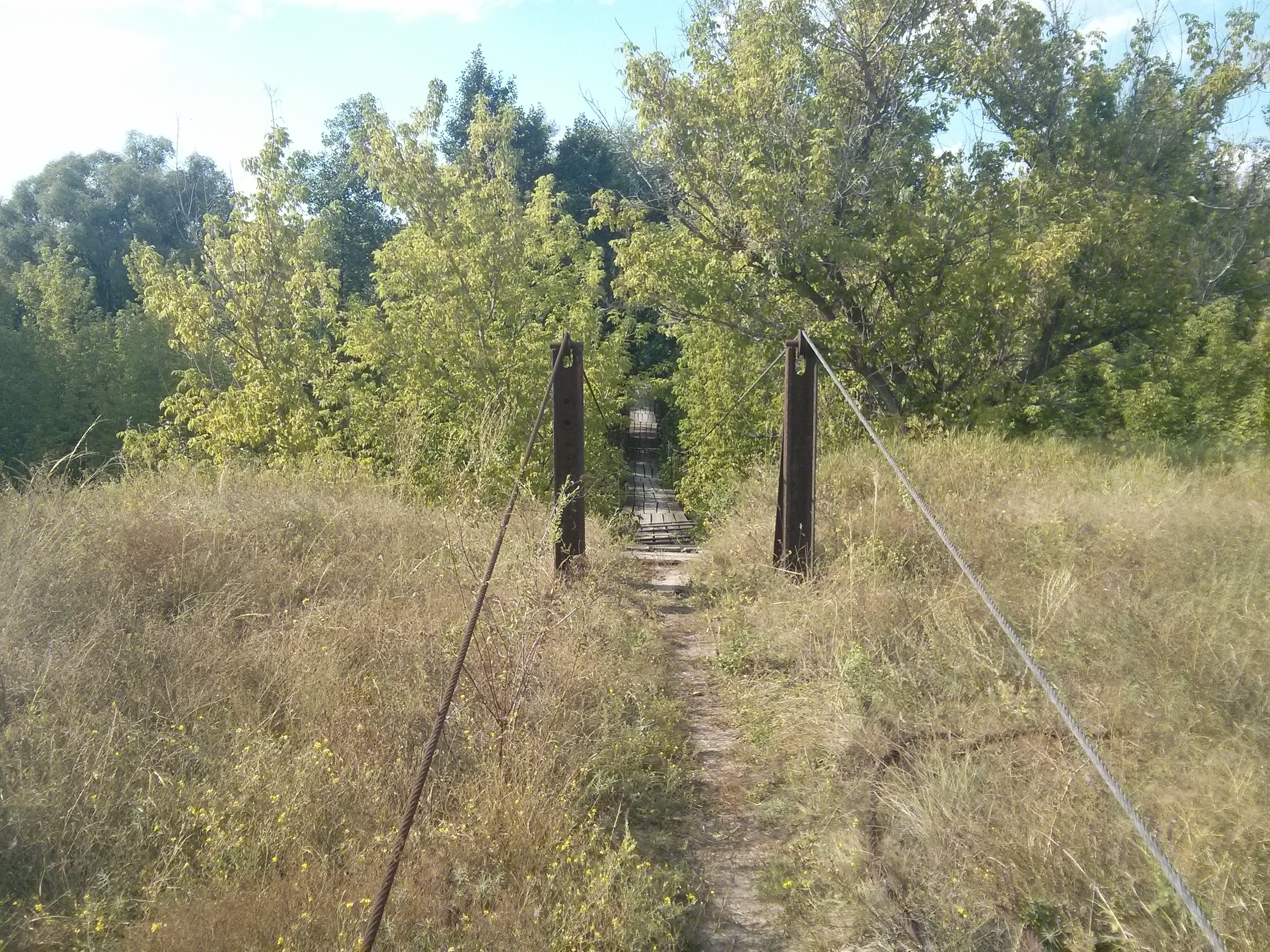 Висячий мост через реку Канадейку, ведущий в Елшанку